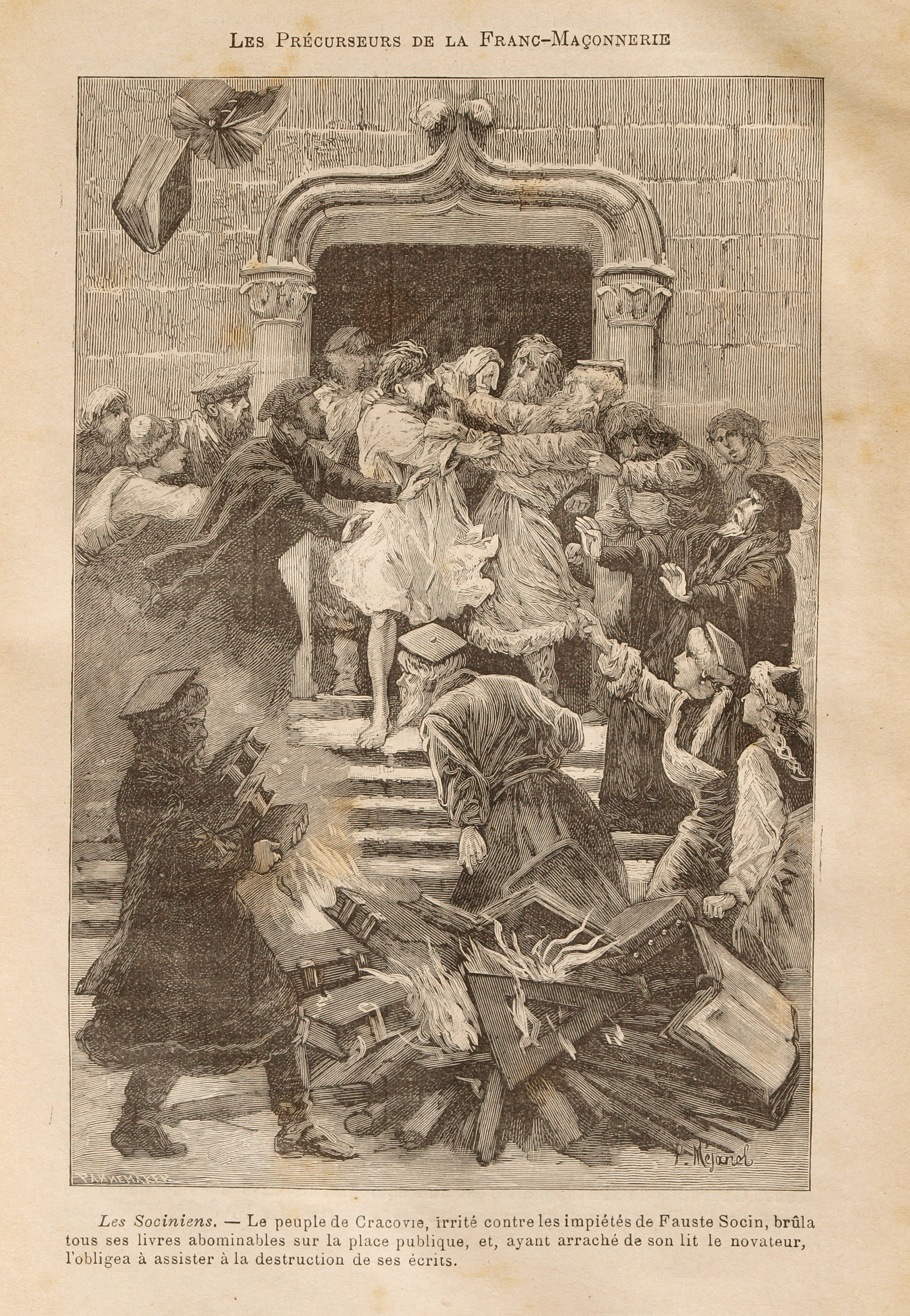 Une des gravures du document de Léo Taxil, Les Mystères de la Franc-Maçonnerie, Paris, 1886.